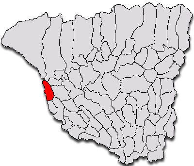 Categorie:Hărţi ale judeţului Gorj